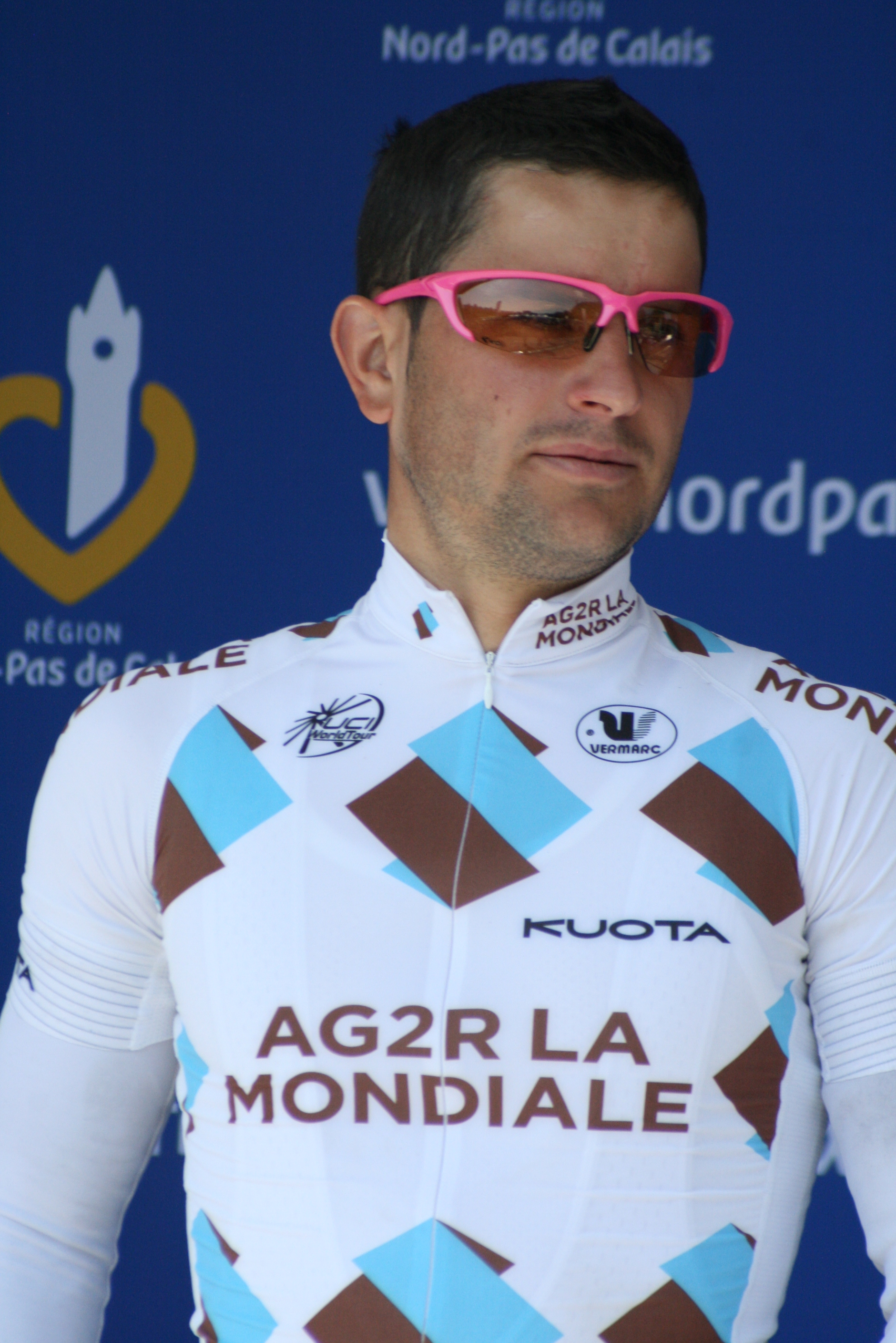 Présentation des coureurs au départ de la première étape Anthony Ravard